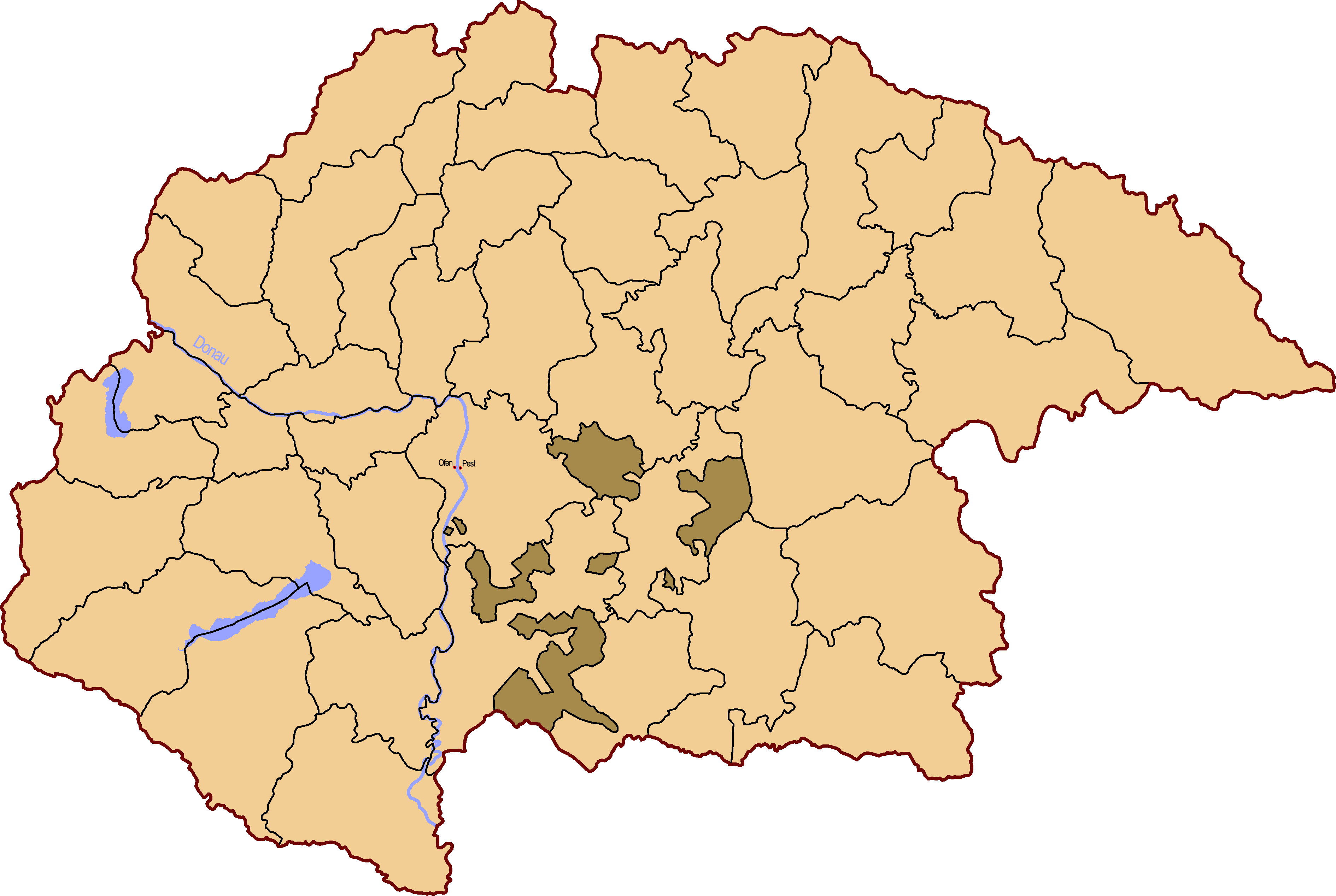 Die Karte zeigt das ungarische Komitat Jazygien und Kumanien (dunkle Stellen) um 1855